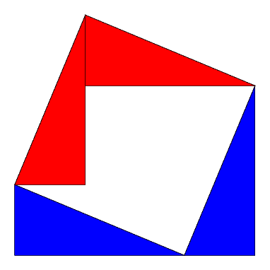 Dimostrazione del teorema di Pitagora messa in rima dall'astronomo inglese Sir George Airy. BW Insultami 17:21, Lug 11, 2005 (CEST)